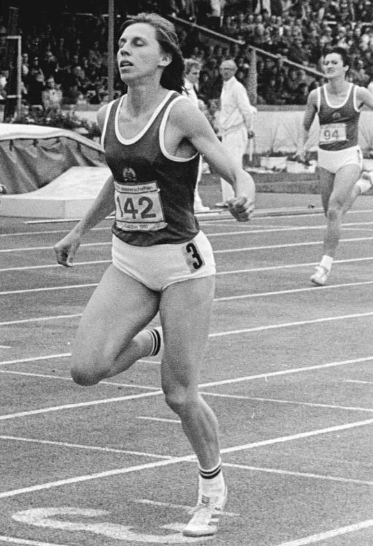 Marita Koch ADN-ZB Kaufhold 17-7-80 Cottbus: 31.DDR-Meisterschaften in der Leichtathletik- Mit 49,55 s gewann DDR-Meister Marita Koch (SC Empor Rostock) den 400-m-Laif.